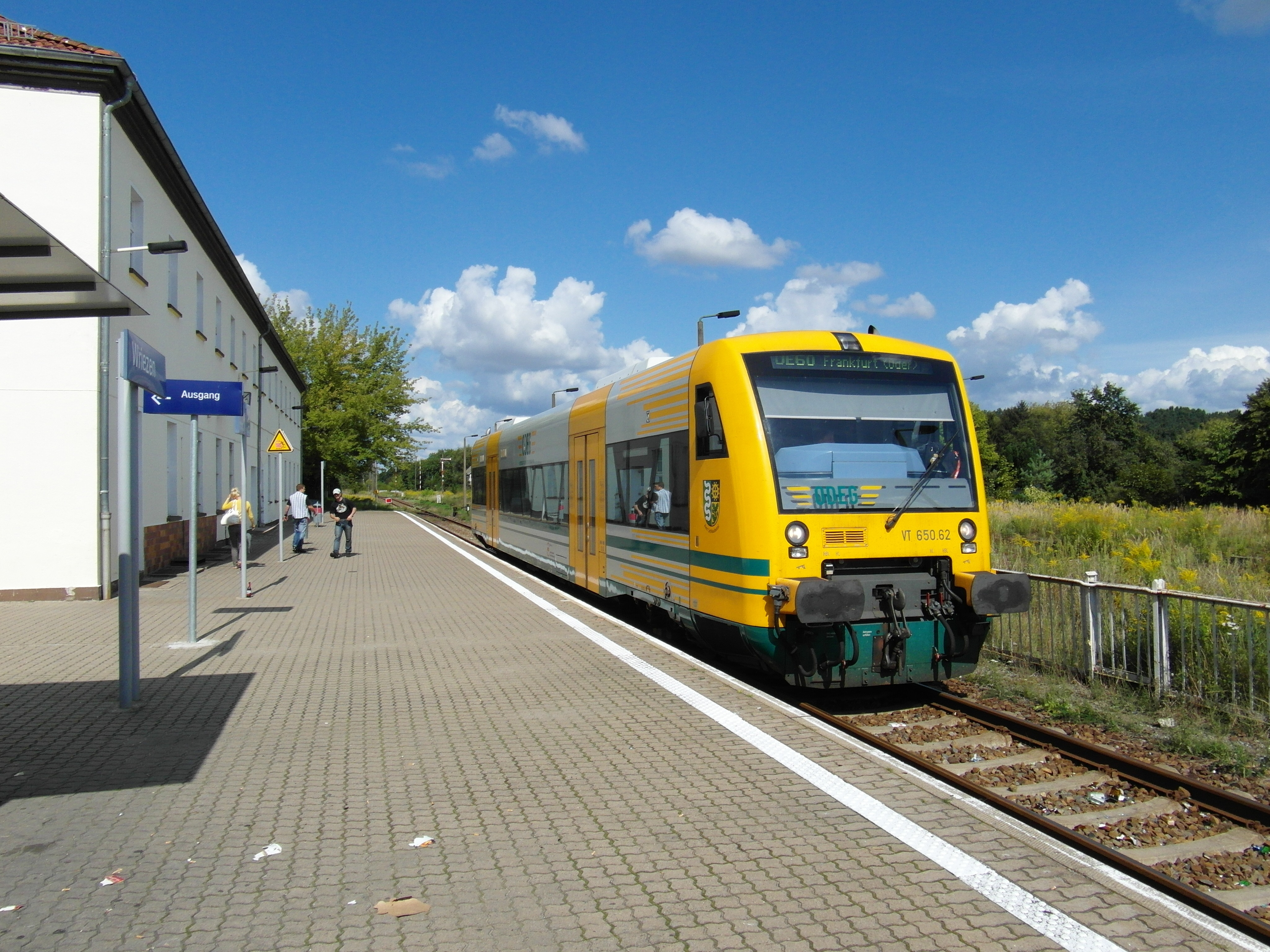 Linie OE 60